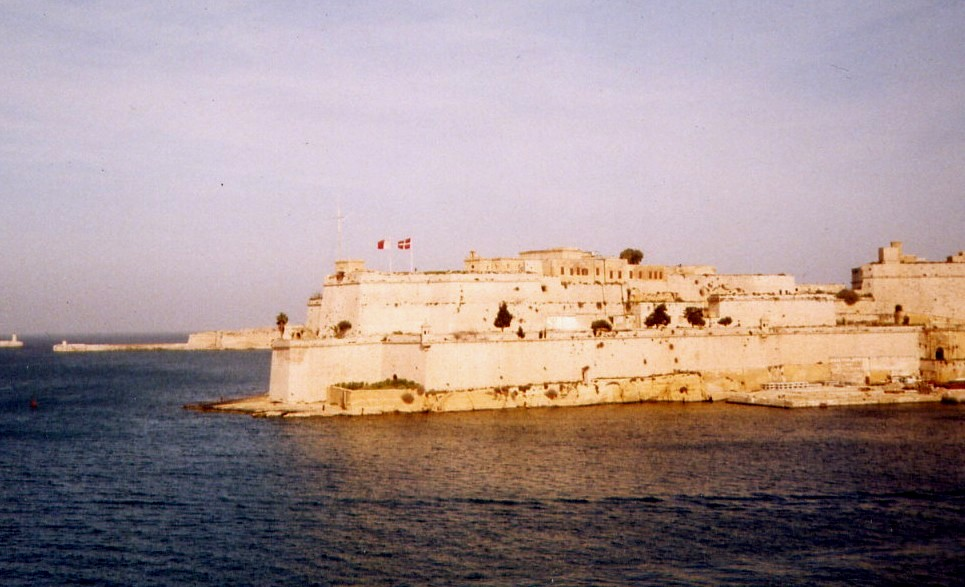 Pevnost Fort St. Angelo (Malta) Foto Boreš 2004 Poskytnuto osobně pro Wikipedii Licence GNU FDL